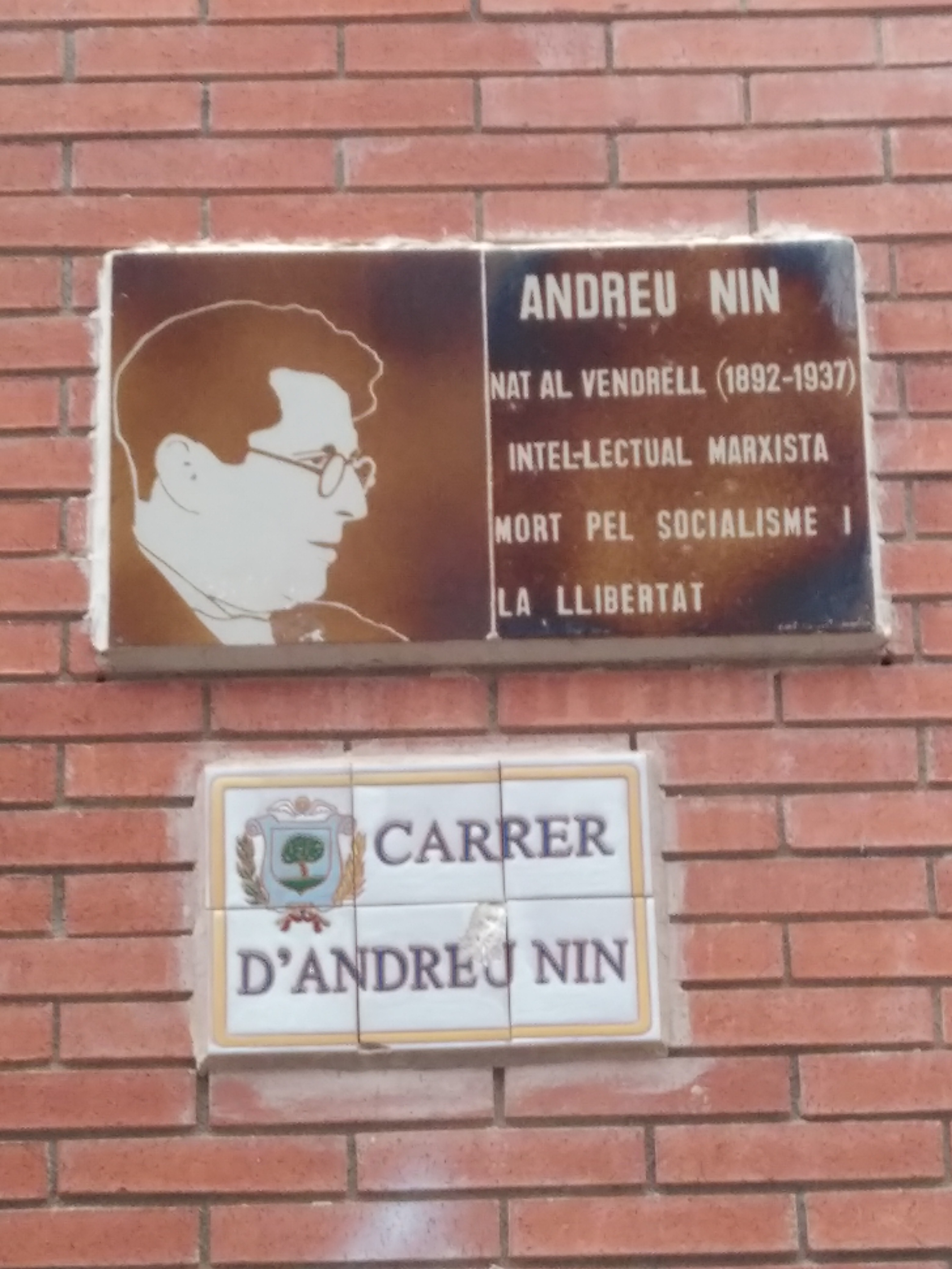 Placa al El Vendrell en memòria d'Andreu Nin